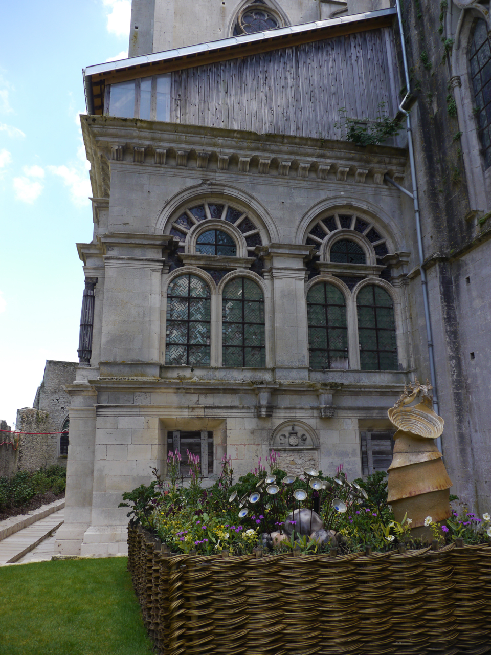 Façade Ouest de la chapelle des Évêques, œuvre majeure de la Renaissance en Lorraine. Cathédrale Saint-Étienne de Toul, Lorraine, France